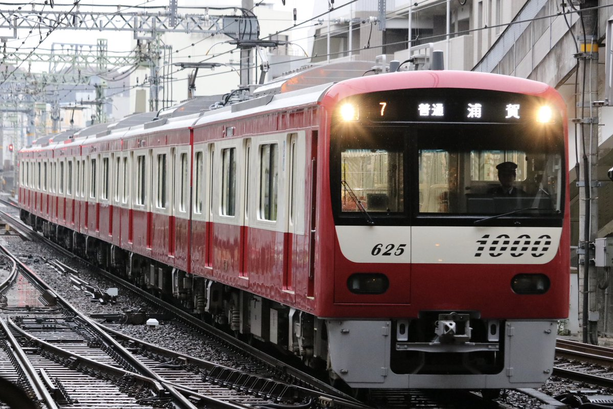 京急新1000形1625- 普通浦賀行き。上大岡駅にて。